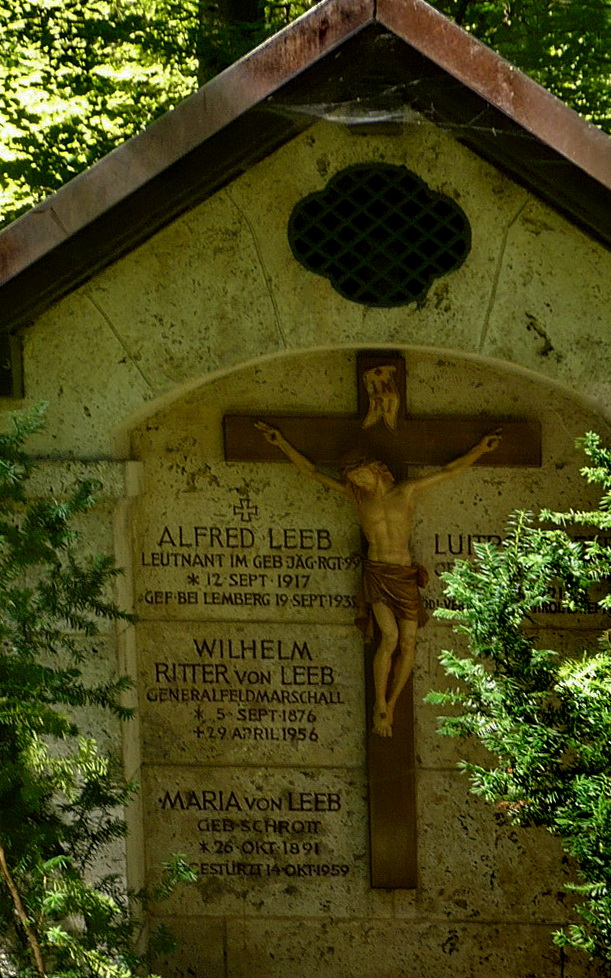 Grabstätte des Ritters Wilhlem Leeb am Sollner Waldfriedhof